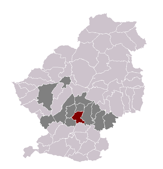 Lewarde dans son canton et son arrondissement